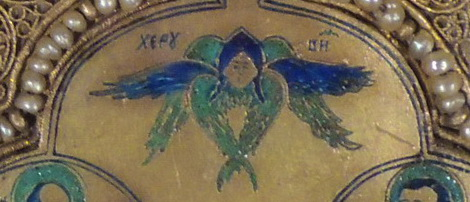 По указанию Ивана Грозного в 1551 году в Новгороде Евангелие было отреставрировано, и для него был создан новый драгоценный оклад. На серебряную позолоченную доску положили серебряную скань, на ней финифтивые миниатюры (в том числе византийской работы X века — 13 миниатюр и XI века — 5; работы русских мастеров — 6 миниатюр XII века в том числе средник с изображением Христа Вседержителя). На скань помещено шесть крупных жемчужин, а край оклада украшен обнизью из мелкого жемчуга. При этой реставрации, по мнению Е. И. Брягина, были подновлены лики евангелистов.